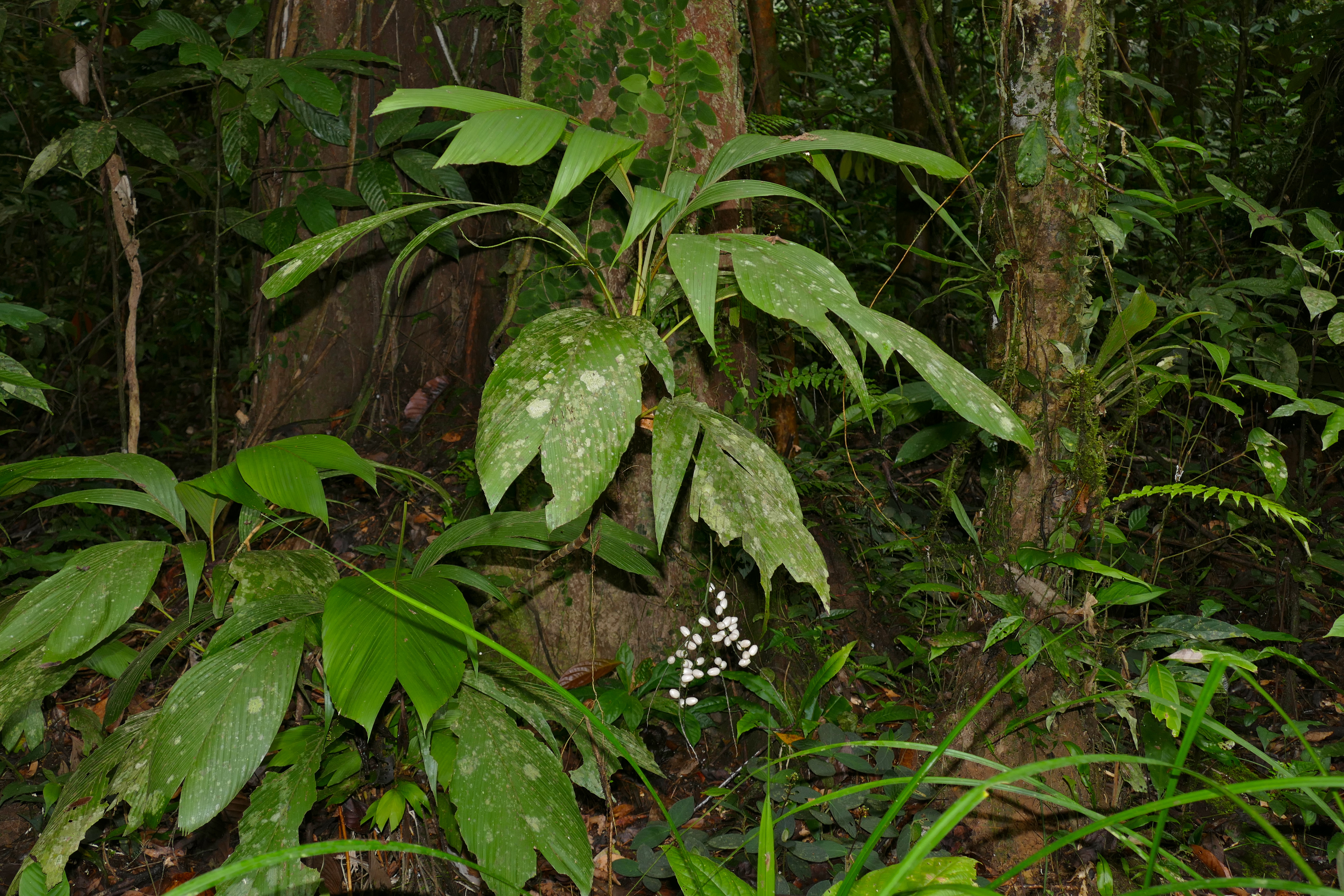 Mulu NP, Sarawak, MALAYSIA